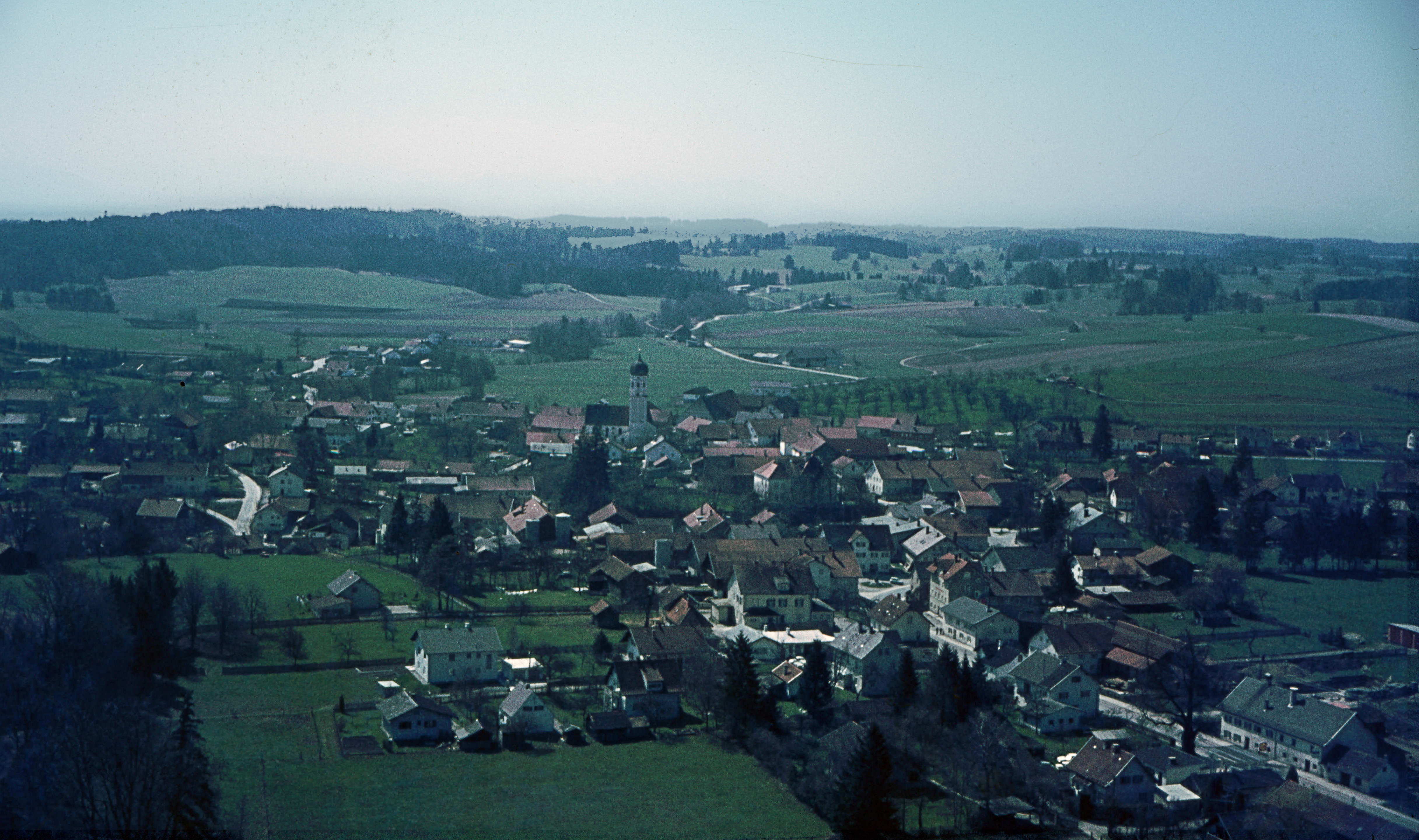 Deutschland, Bayern, Landkreis Starnberg, Andechs, Blick vom Turm der Wallfahrtskirche ca. 1970